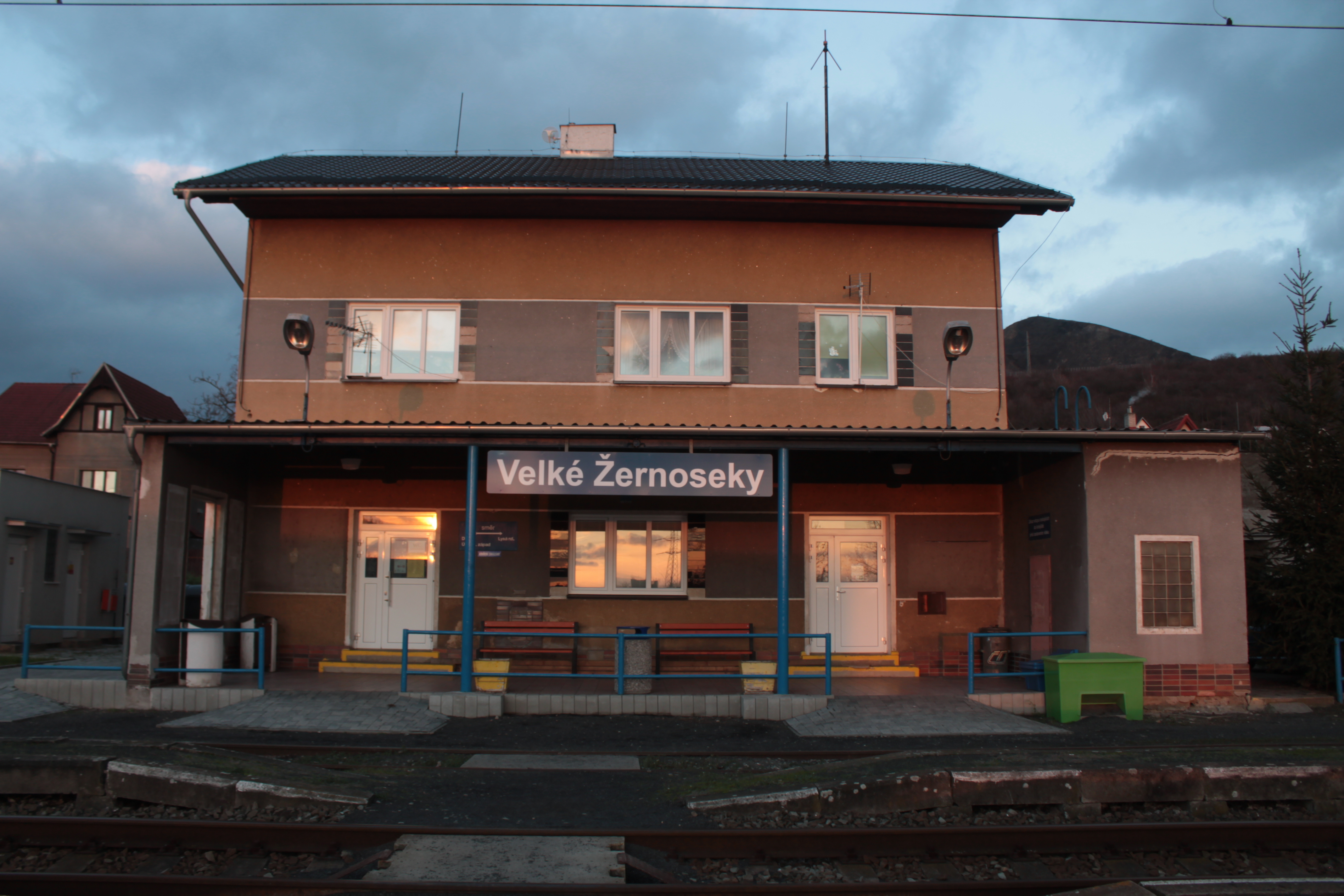 žst. Velké Žernoseky, pohled z kolejiště